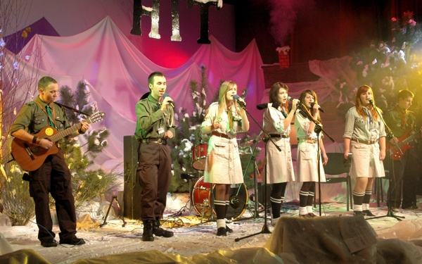 Zdobywcy Grand Prix festiwalu HiT 2009 zespół "Zamszowa Pufa"